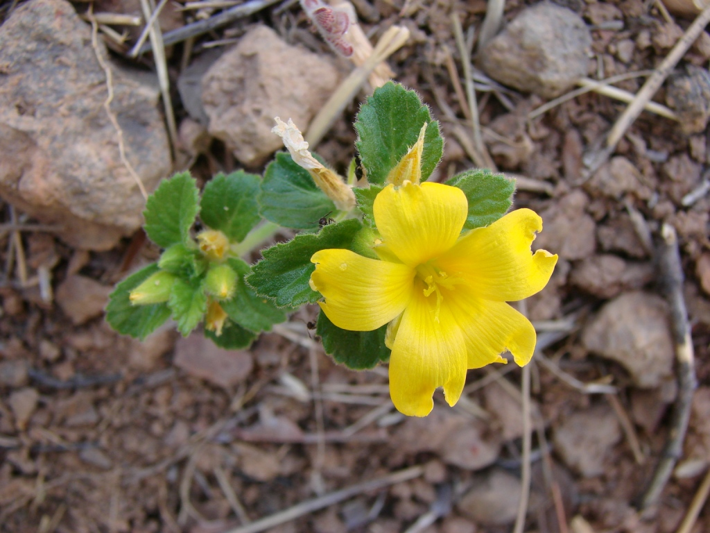 Turnera pumilea L. - TURNERACEAE - APA da Bacia do Rio São Bartolomeu - Brasília - Distrito Federal - Brasil.